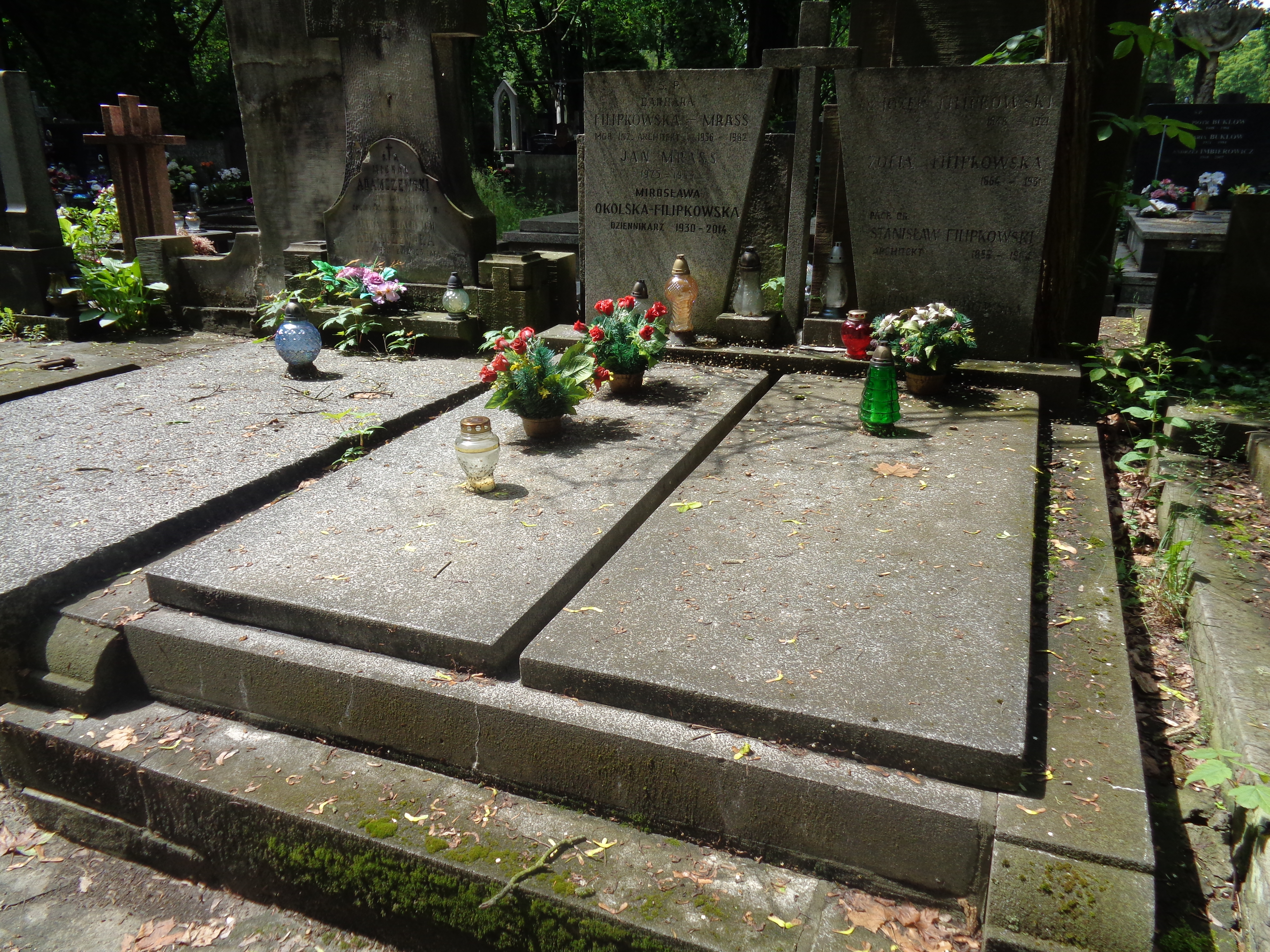 Grób Stanisława Filipkowskiego na Cmentarzu Powązkowskim